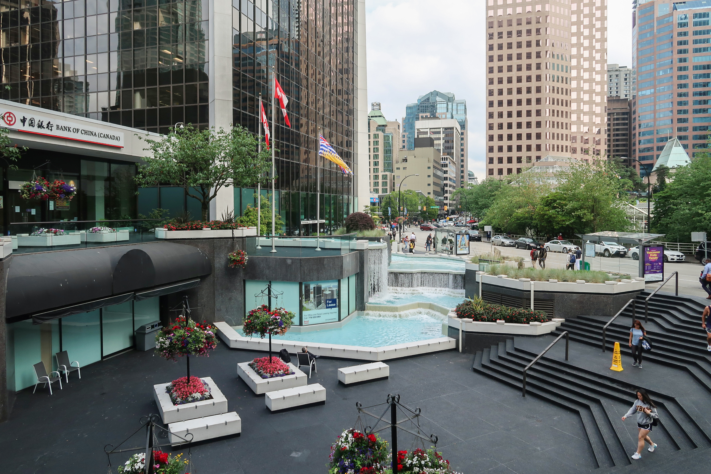 Bentall Centre